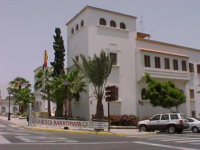 Dirección Insular del Gobierno en Fuerteventura